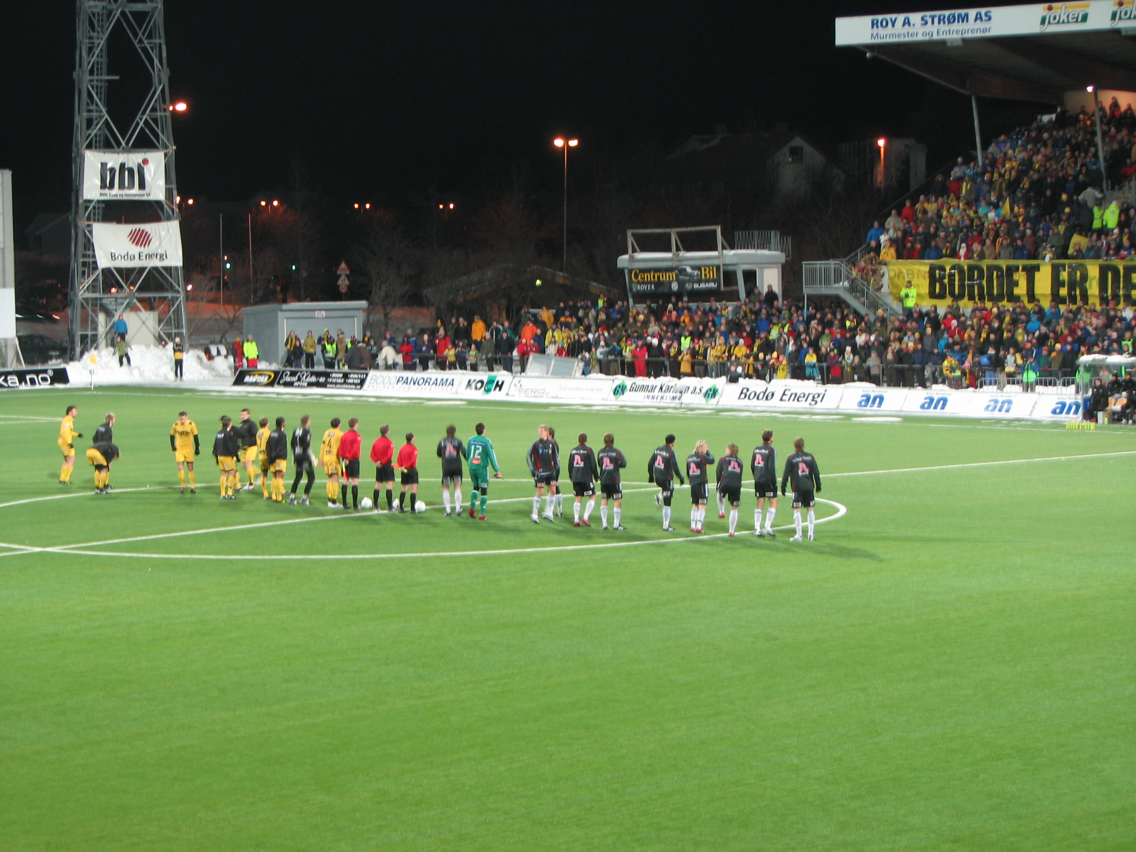 Tippeligakvalifiseringen mellom Bodø/Glimt og Odd Grenland. Lagoppstilling